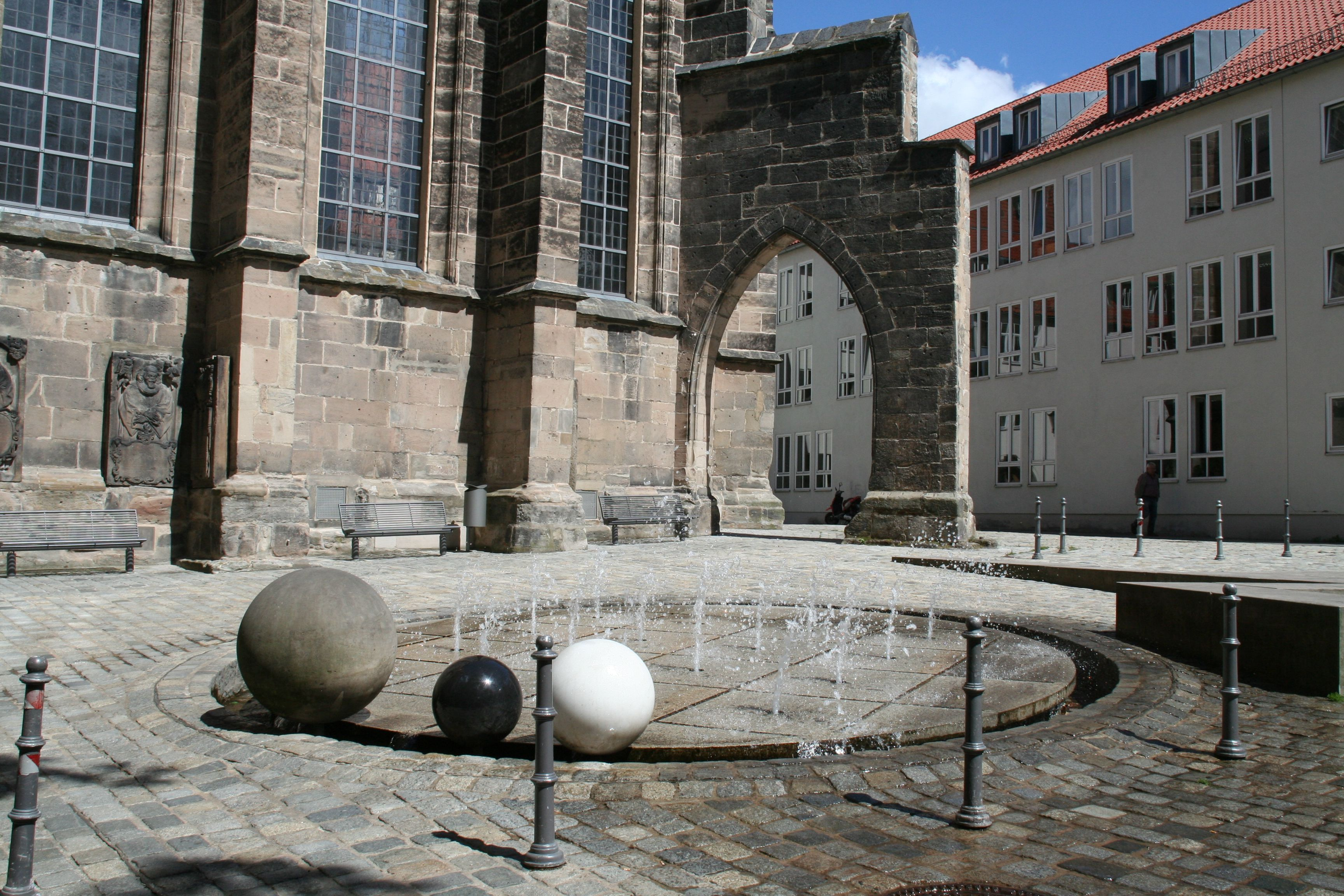 Brunnen in Pfarrgasse vor St. Moriz in Coburg